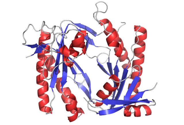 ADENYLYL CYCLASE PDB ID:1AZS データ元 Pymolを用いてC1AドメインとC2Aドメインを表示。